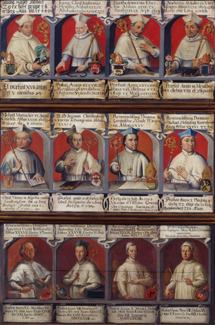 Weißenauer Äbtetafel (Nr. 4 von 4), 189,5 x 130 cm (mit Rahmen), Landesmuseum Württemberg, WLM 898 d